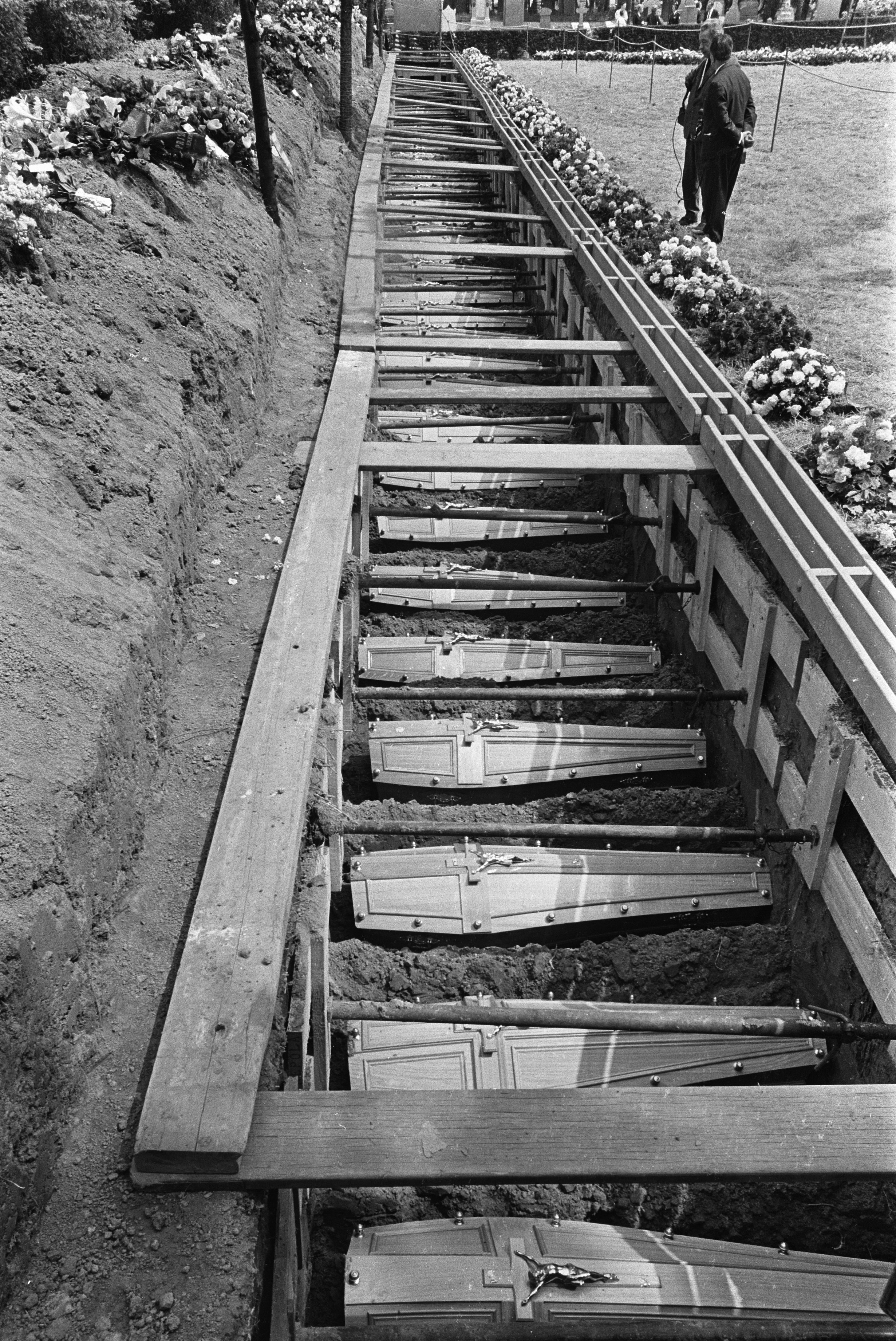 Slachtoffers brand in warenhuis Innovation te Brussel begraven, de graven